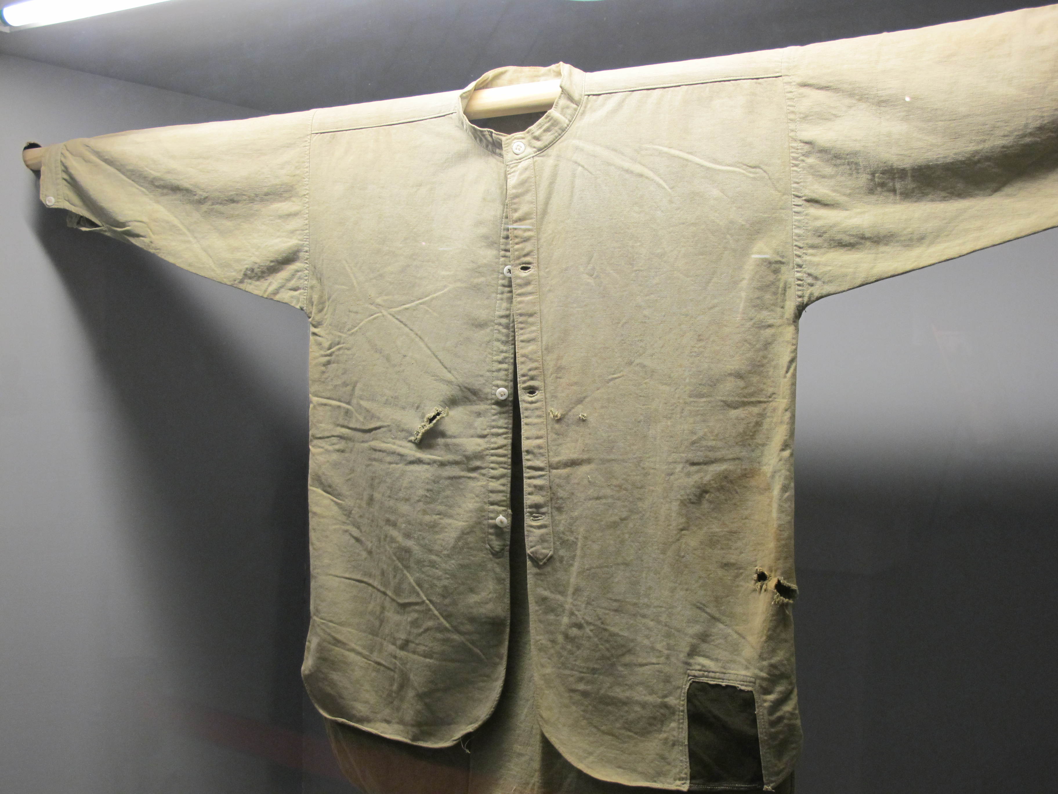 陳澄波二二八受難時身上穿的衣服，刀痕彈孔清晰可見。曾於台北二二八紀念館展出，現為其後代所保存。